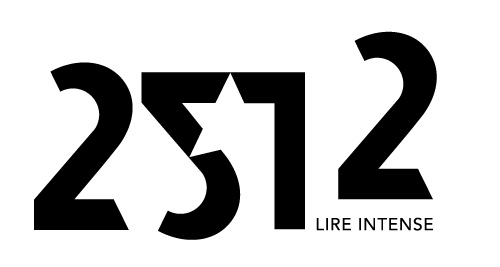 Logo du magazine réunionnais 2512.